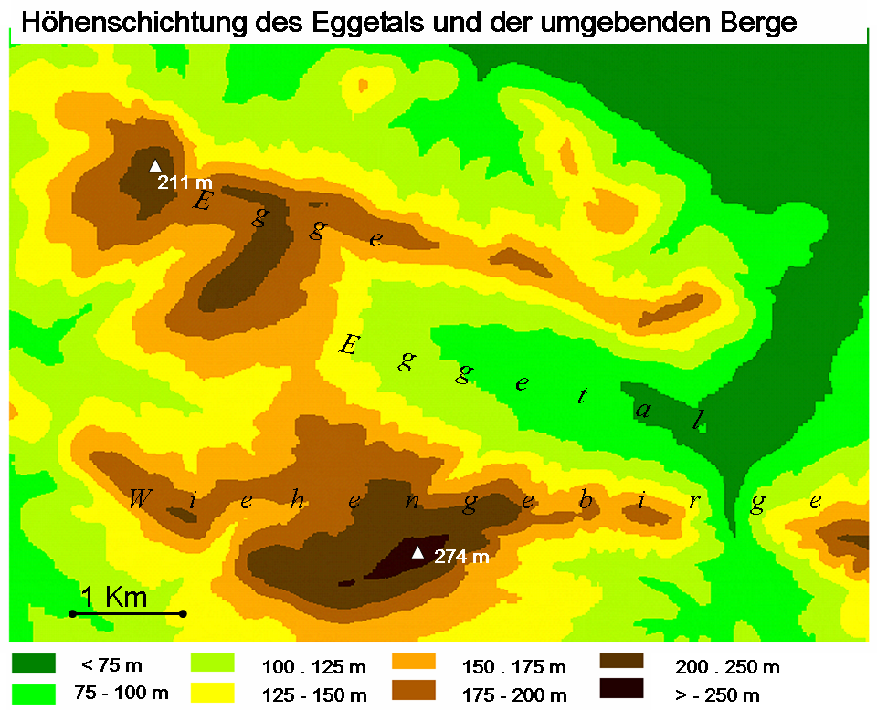 Höhenschichtung des Eggetals